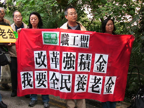 中文（香港）: 香港職工會聯盟 反強積金